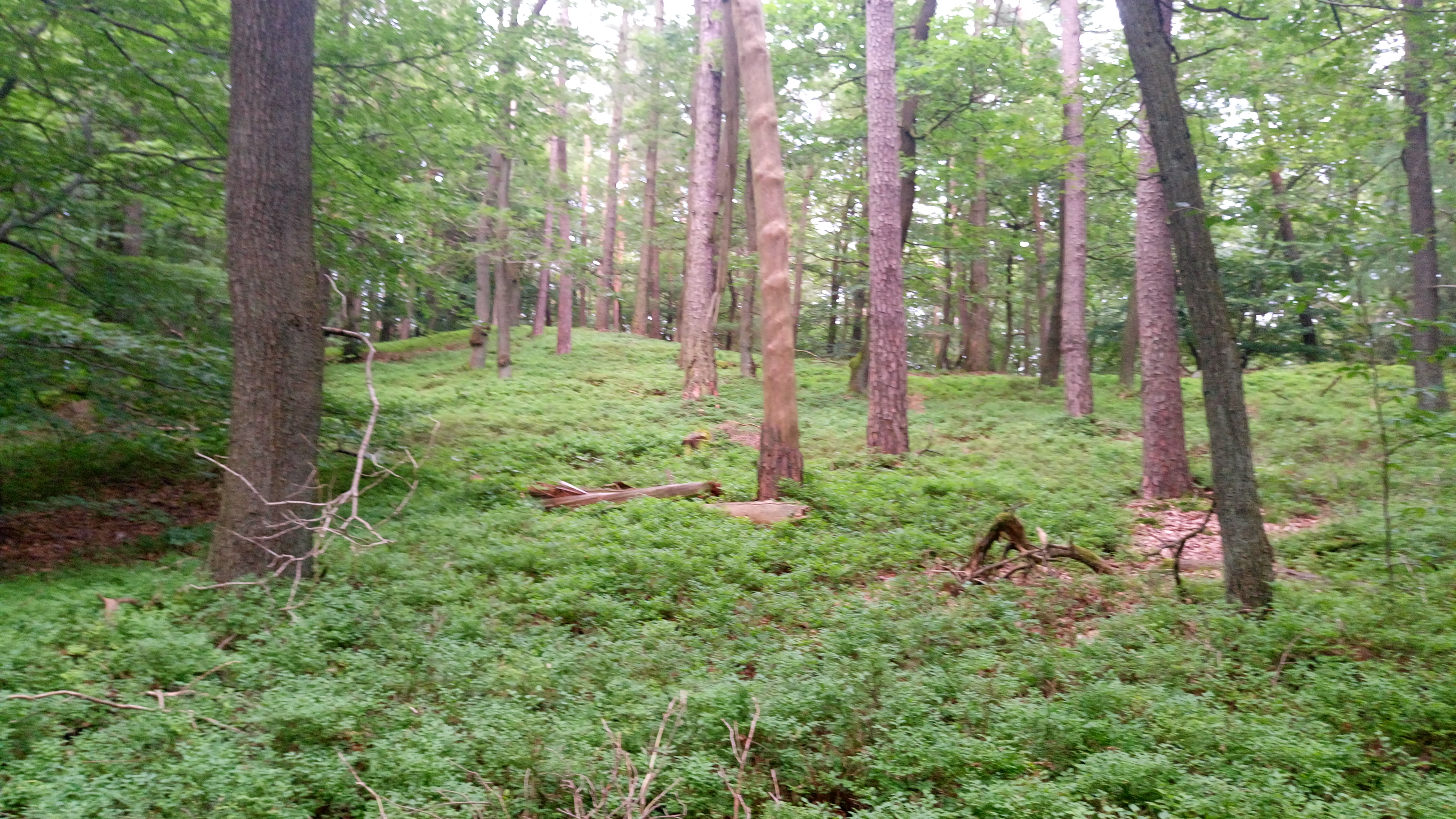 Gipfelbereich der Hohen Mark